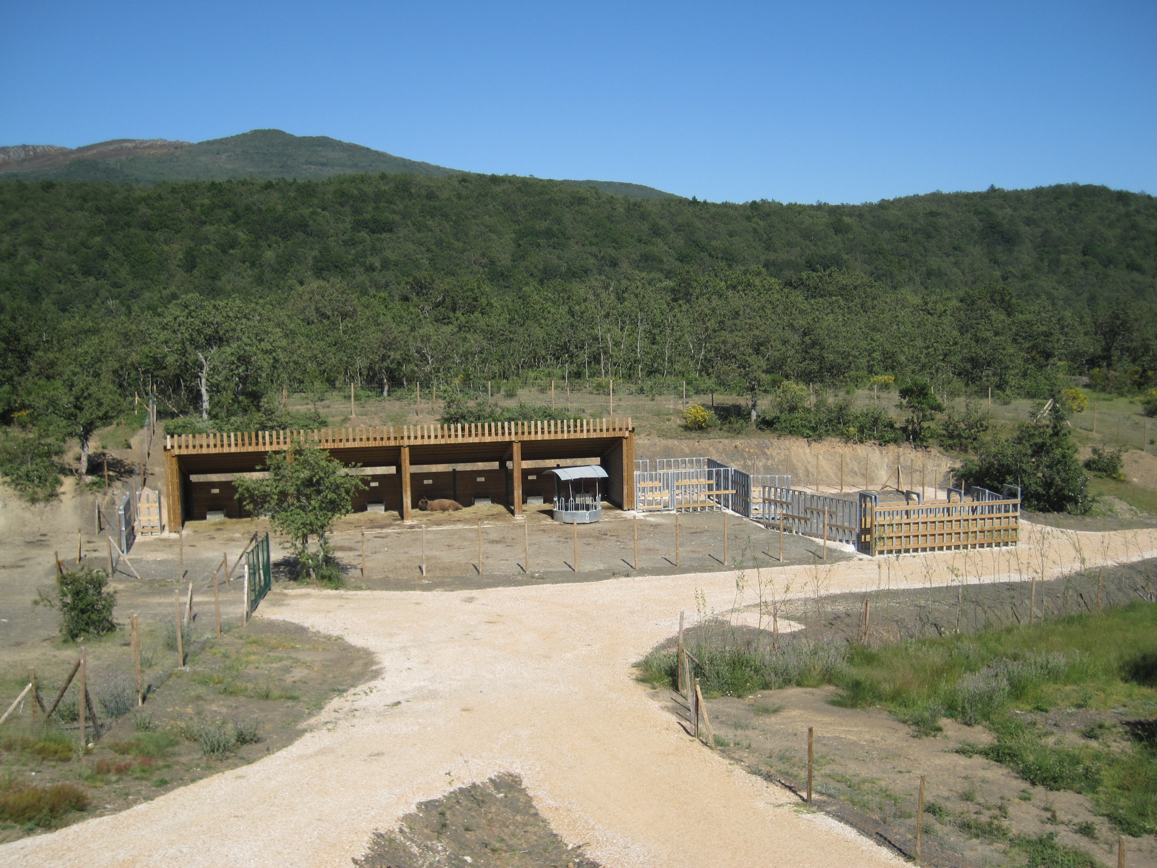 Reserva del Bisonte Europeo, en San Cebrián de Mudá (Palencia, España).